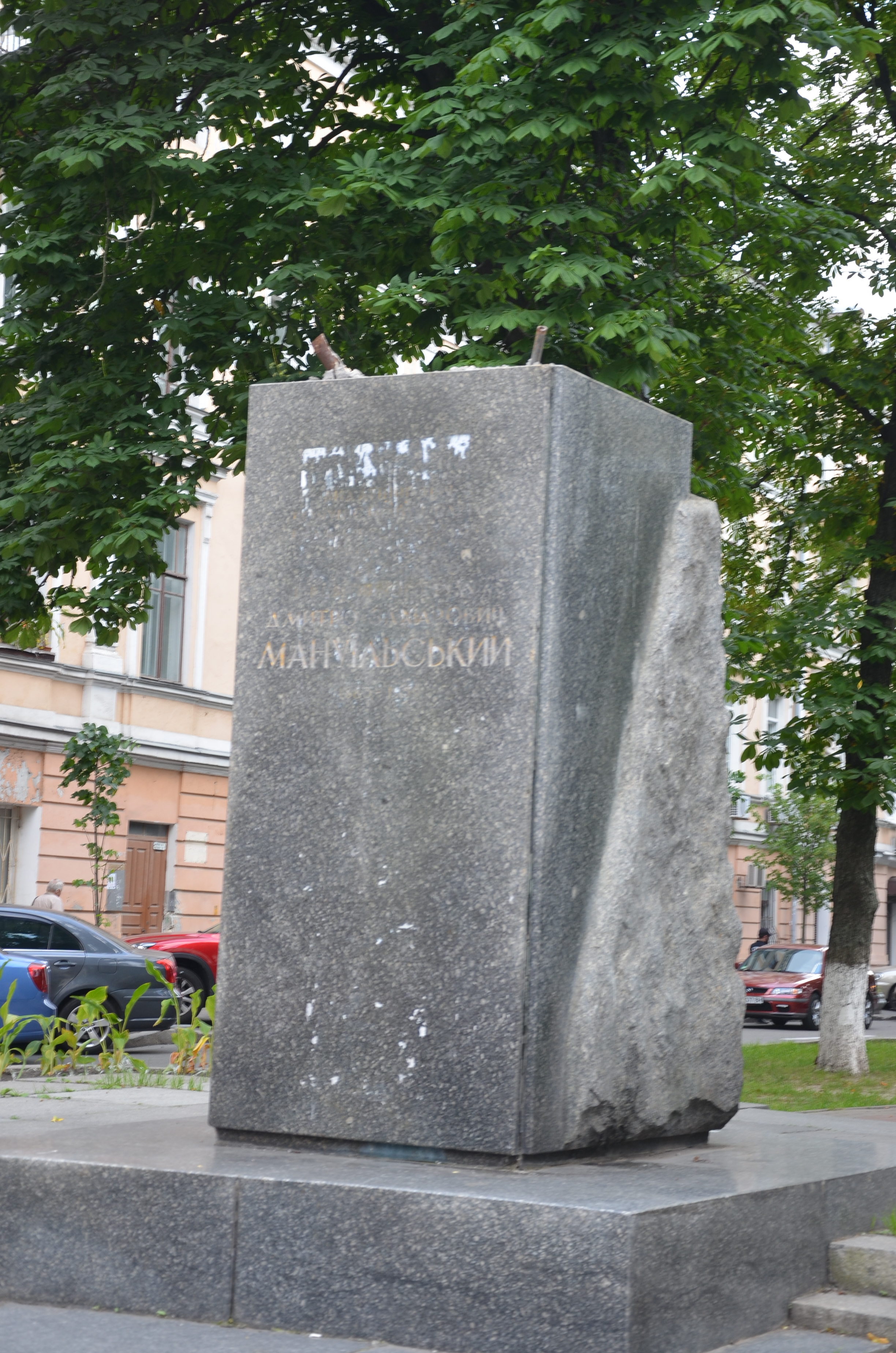 На цьому місті по вулиці Липській у Києві розташовувався пам'ятник Д. З. Мануїльському, радянському державному діячеві.